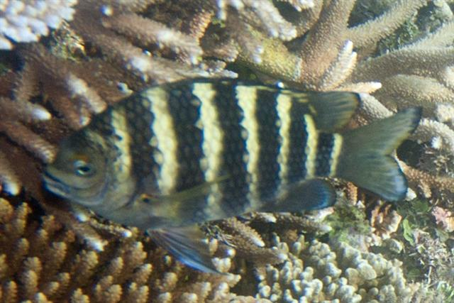 Abudefduf septemfasciatus